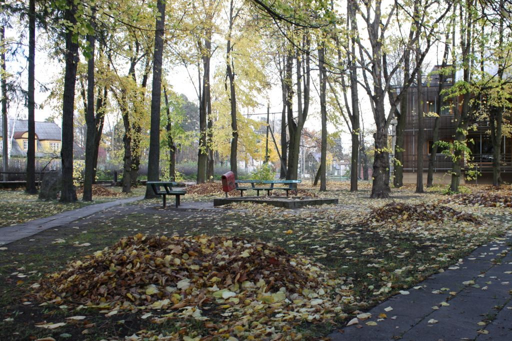 Mai park, Tallinn.